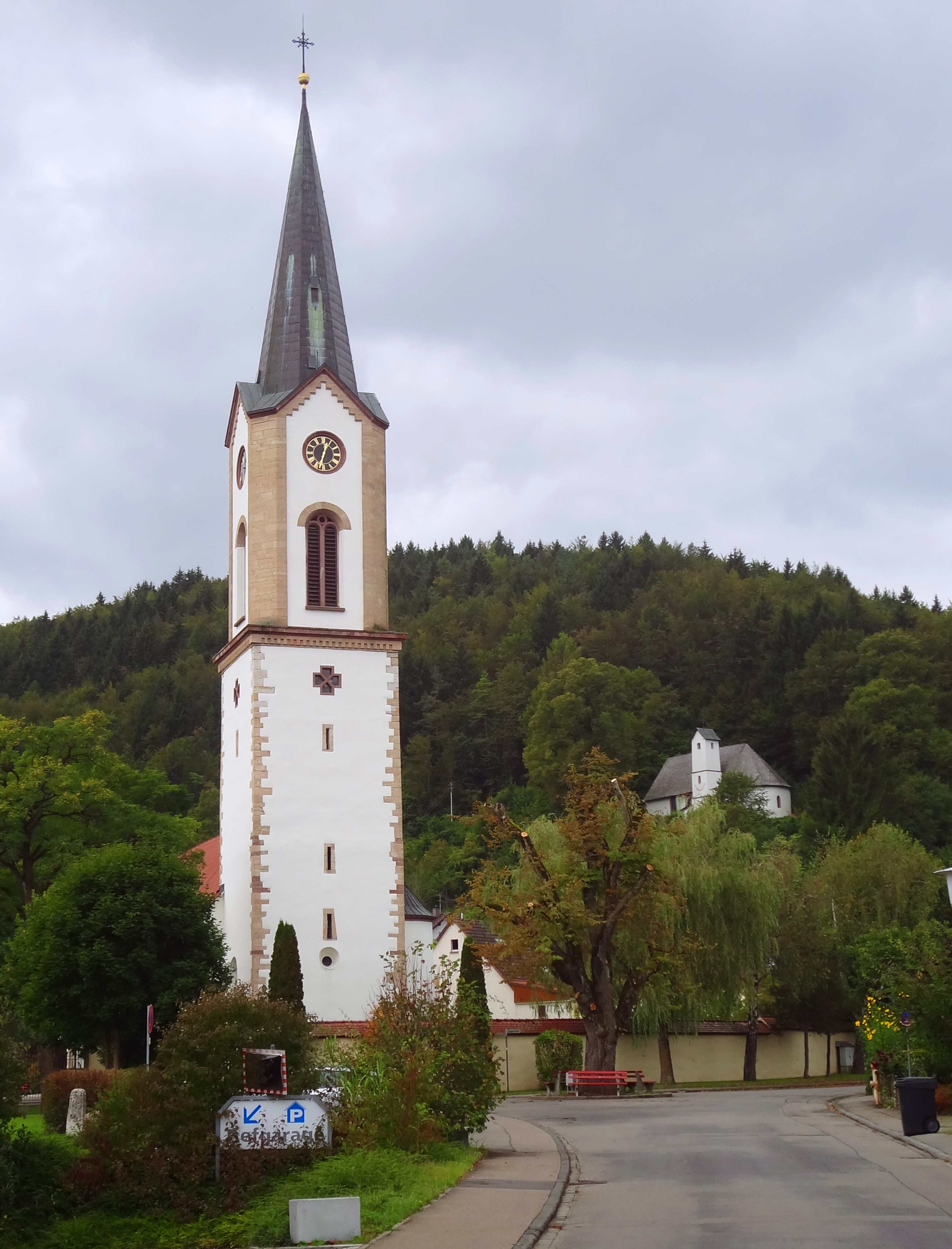 St. Marienkirche in Kirchen-Hausen und Antonius-Kapelle